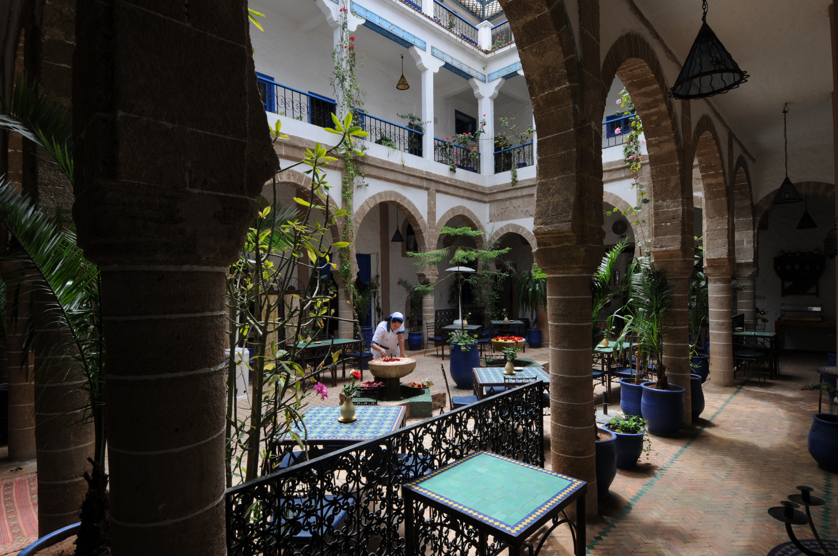 Essaouira_188.JPG maroc